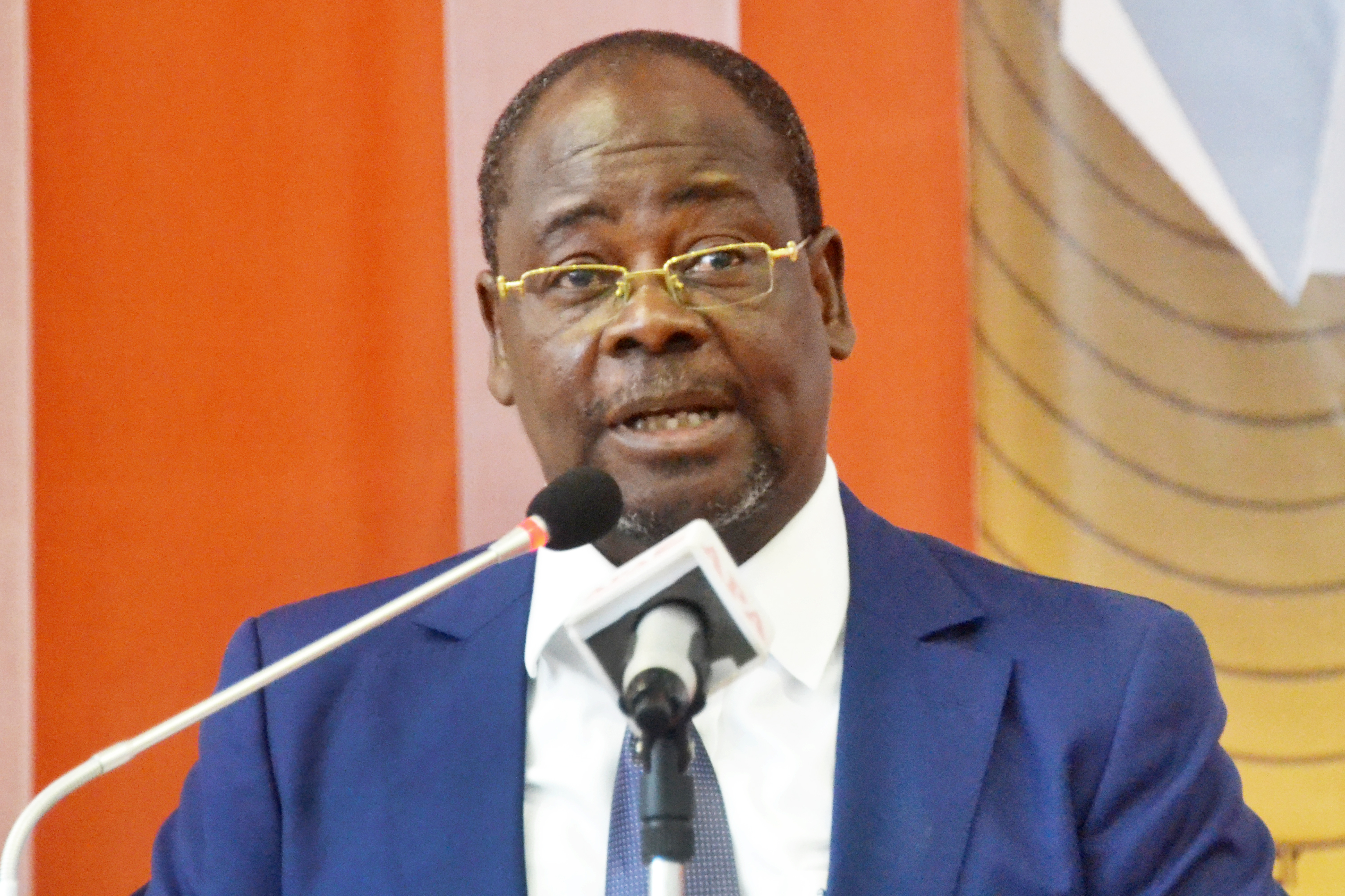 Venance Konan, journaliste et écrivain ivoirien